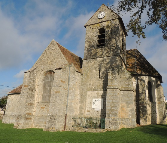 Église Saint-Geneviève de Courtomer: Sud du transept, clocher, monument aux morts et chevet